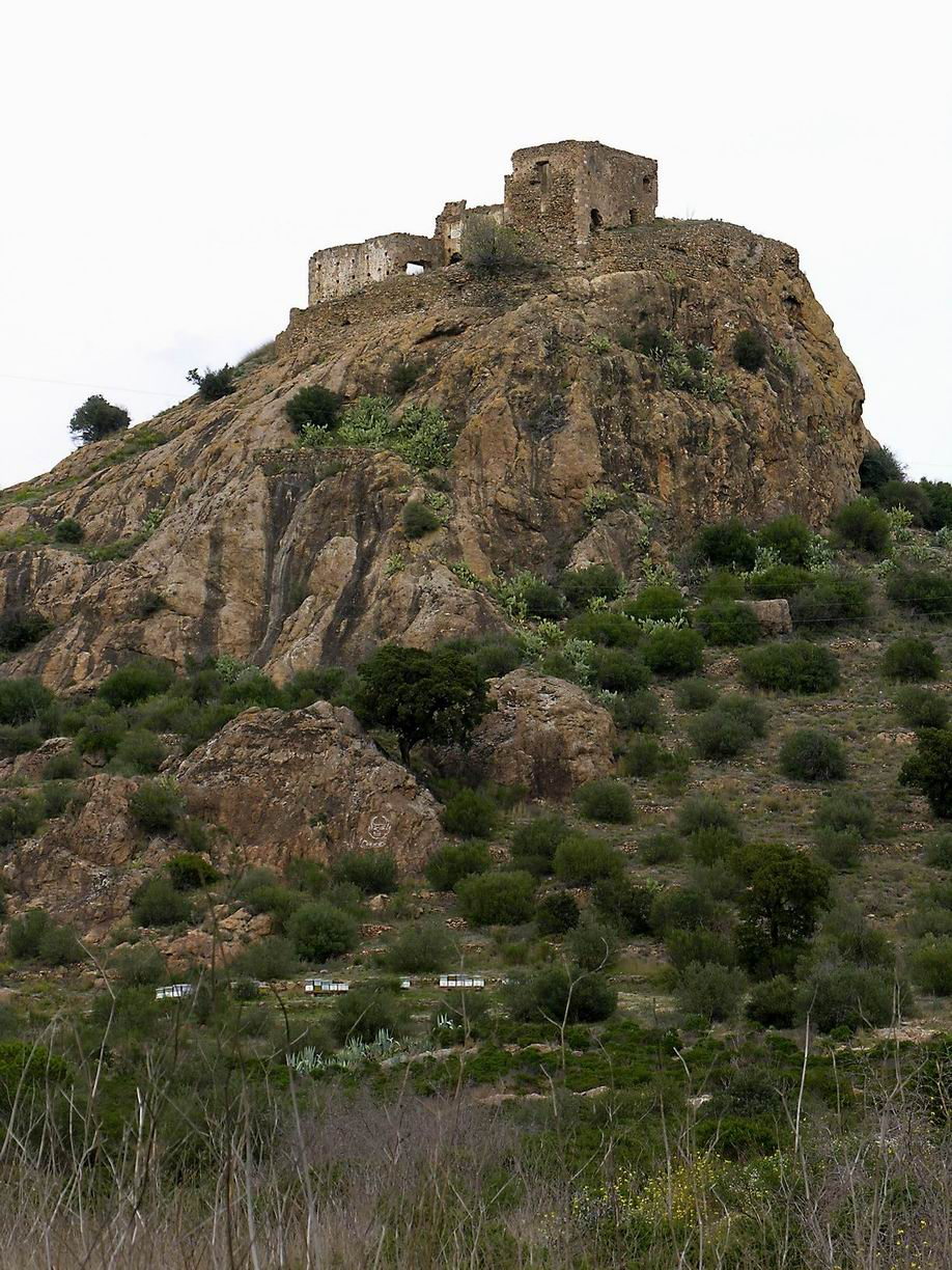 Castell de Quermançó, a Vilajuïga, Alt Empordà